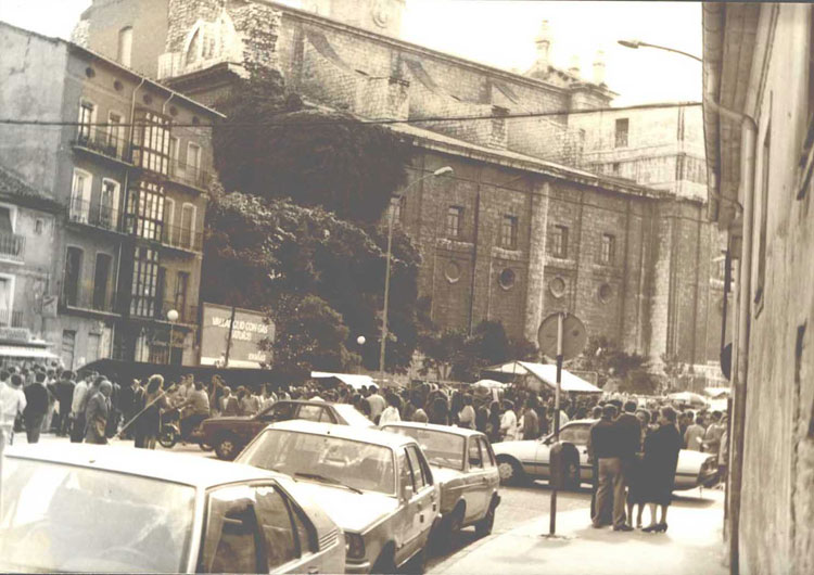 Fotografía de la Catedral de Valladolid. Lado sur. Mercadillo en la plaza de Portugalete. - Fotografía 125 x 90 mm B/N